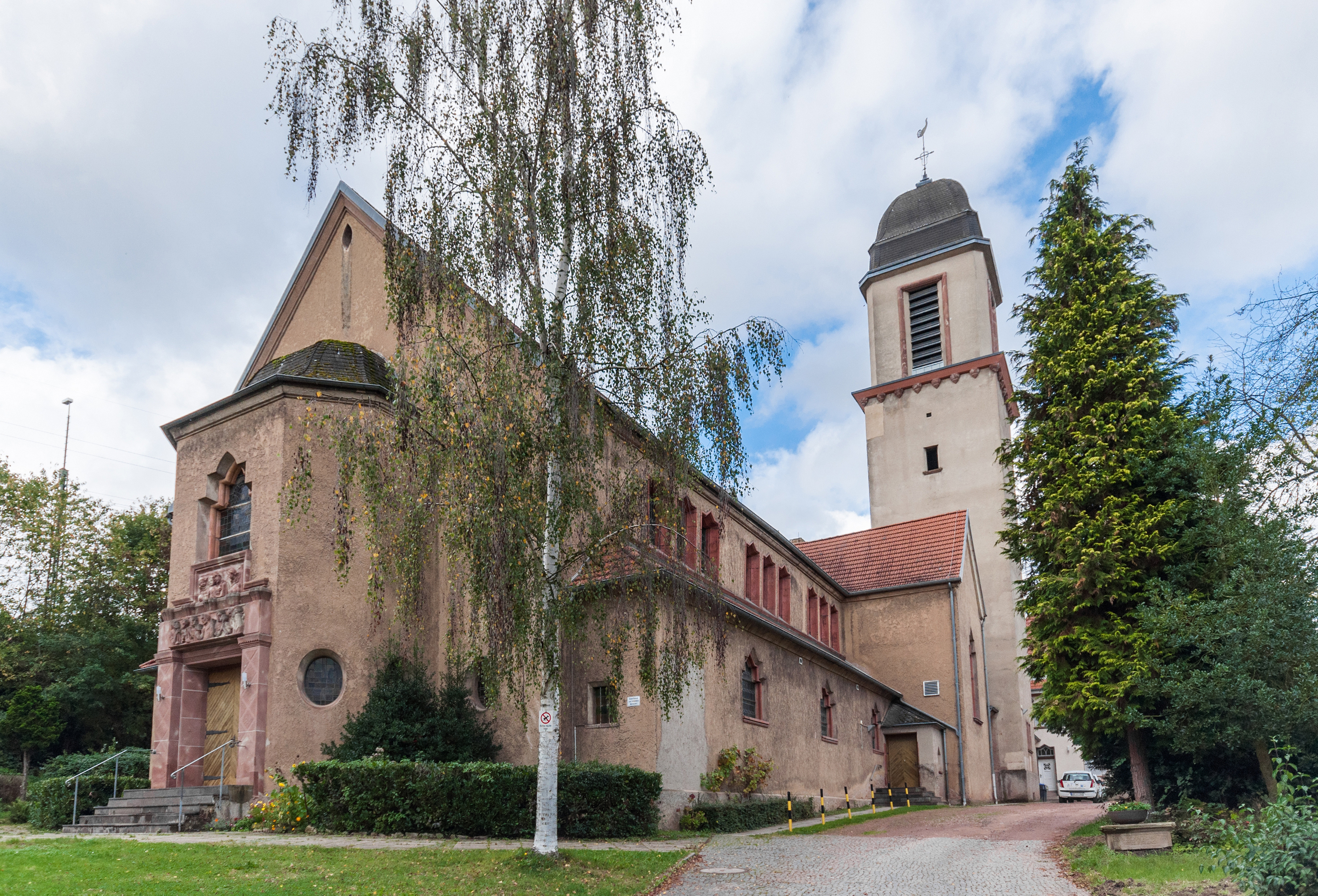 Die kath. Kirche St. Marien im Saarbrücker Stadtteil Rußhütte-Malstatt.